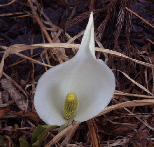 Asian skunk cabbage in Tsurunoyu Spa,Tazawako,Senboku City,Akita Prefecture,Japan